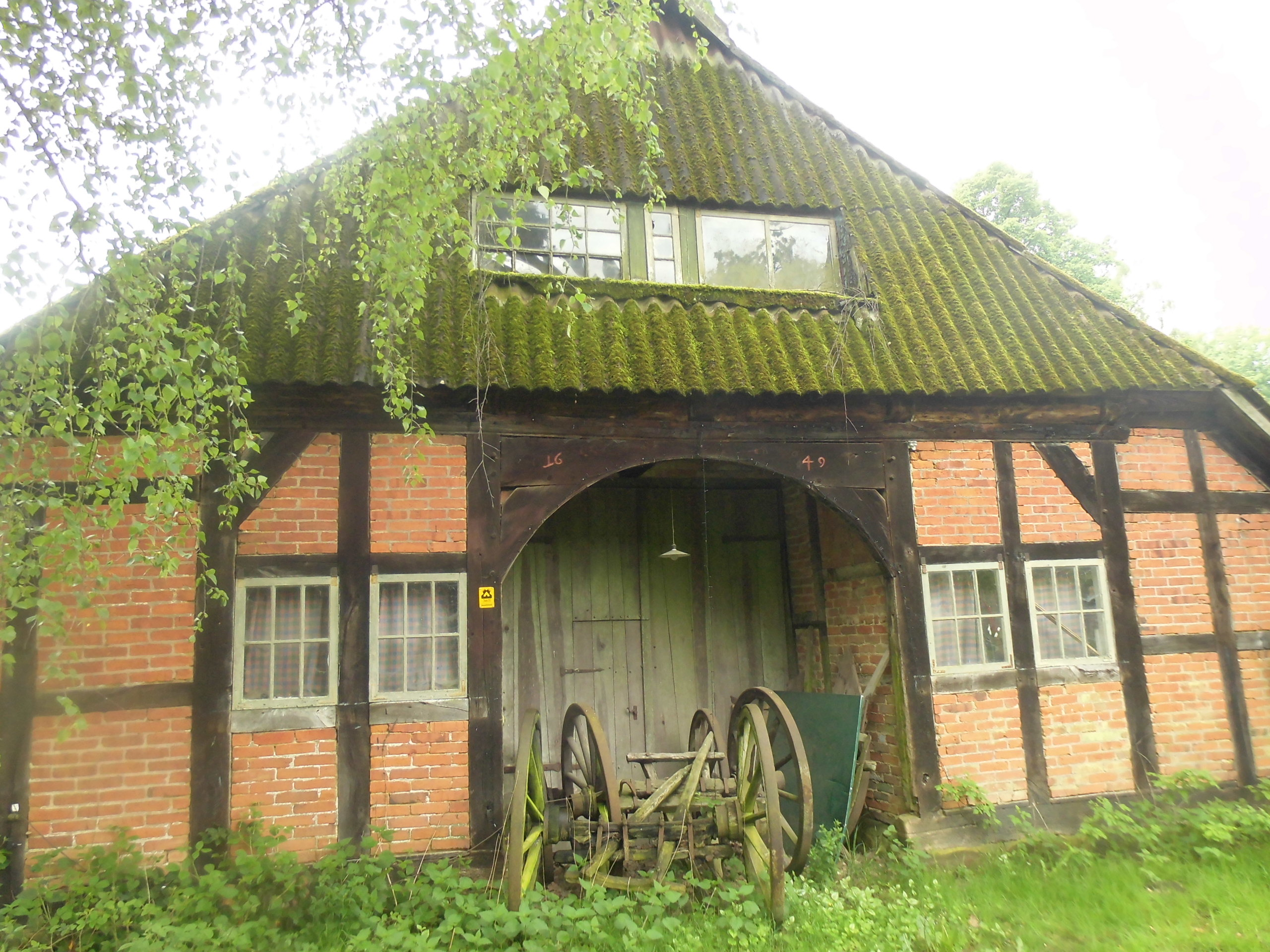 Nordostseite, Giebel mit Tor